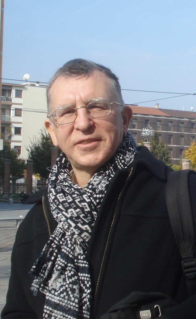 Gimė: 1954 m. sausio 10 d. Anykščių rajone, Debeikiuose Gyvena: Vilniuje Veikla: Lietuvos žurnalistas